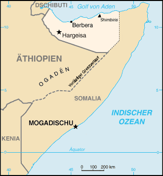 Karte des international nicht anerkannten Staates Somaliland